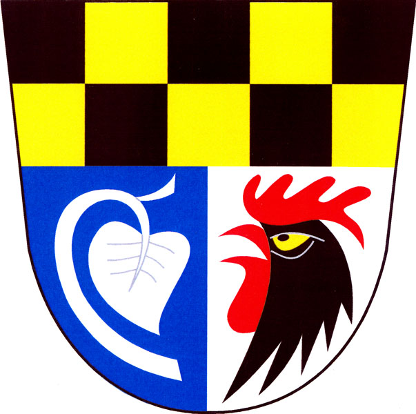 Znak obce Morašice (okres Chrudim)